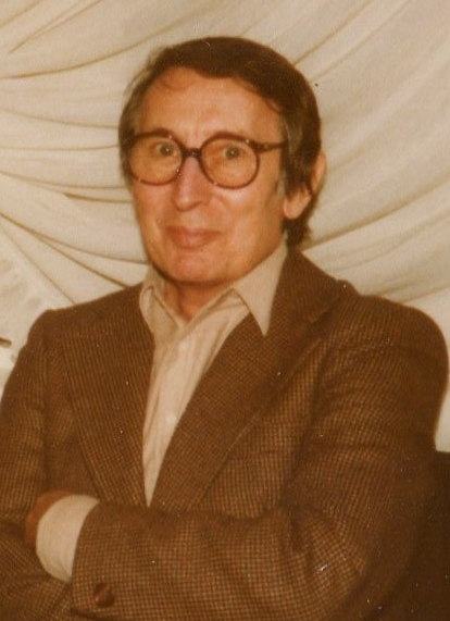 Porträt Hermann Peter Reiser, MdB für den Wahlkreis Pinneberg und langjähriger Leiter des Freitagsmagazins des Norddeutschen Rundfunks